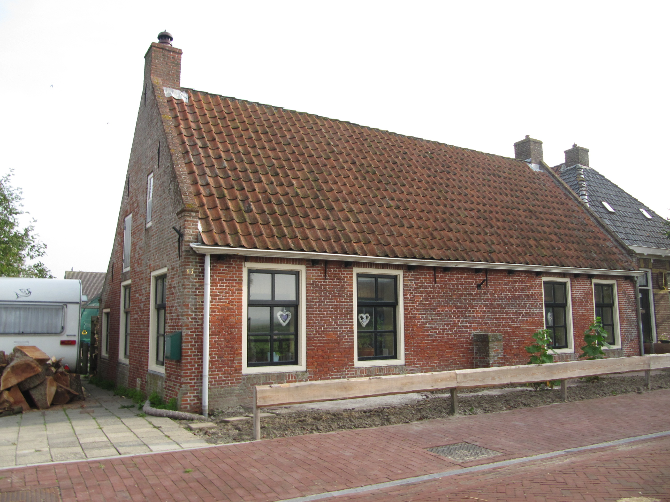 RM15852 Dongjum - Dorpsstraat 13.jpg